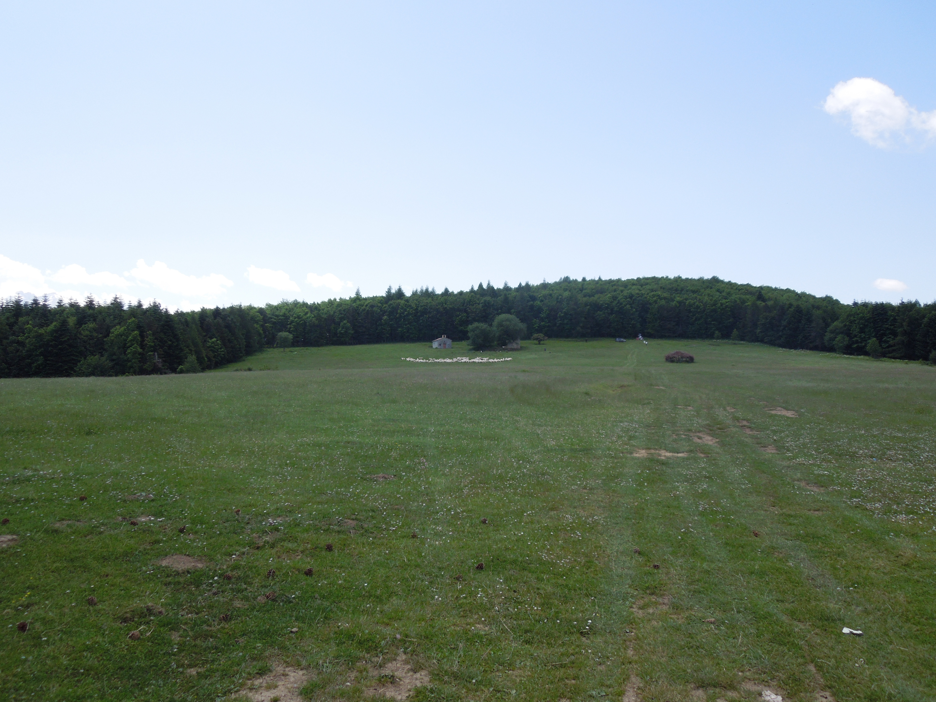 Piano Roseto, altopiano nel territorio comunale di Crognaleto in provincia di Teramo.